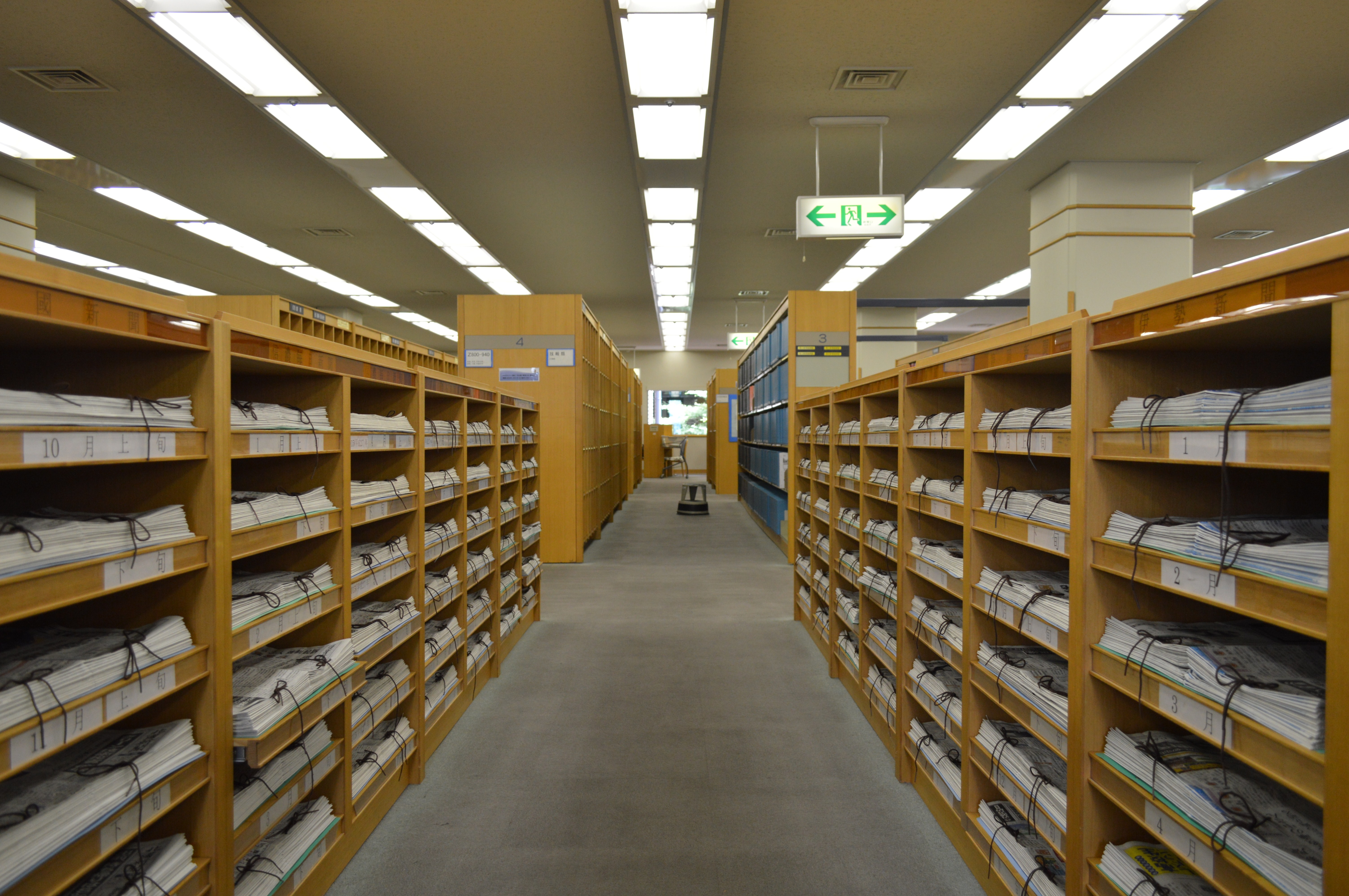 愛知県図書館2階。雑誌コーナー。新聞：上旬・下旬。